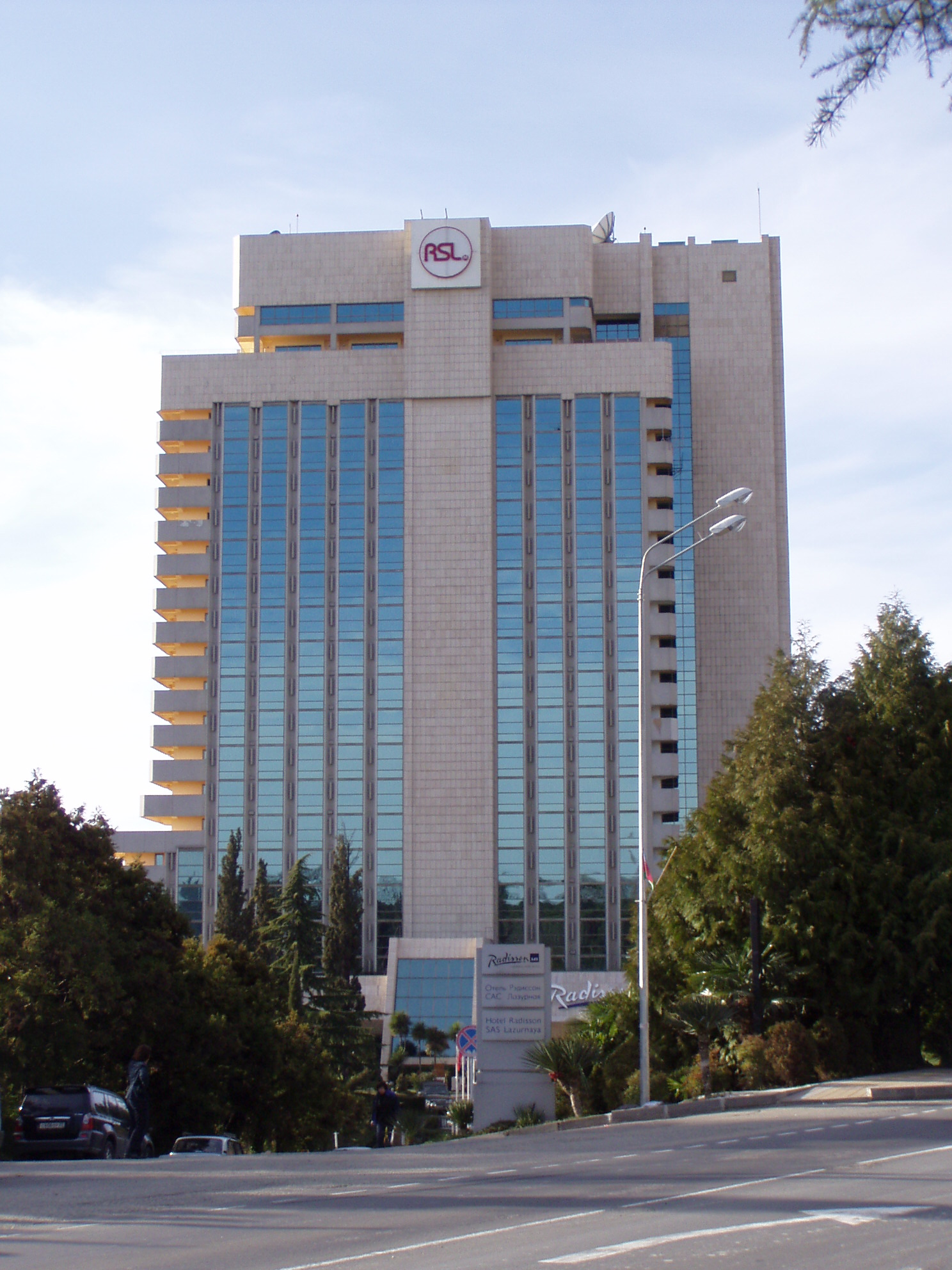 Рэдиссон САС Лазурная в Сочи